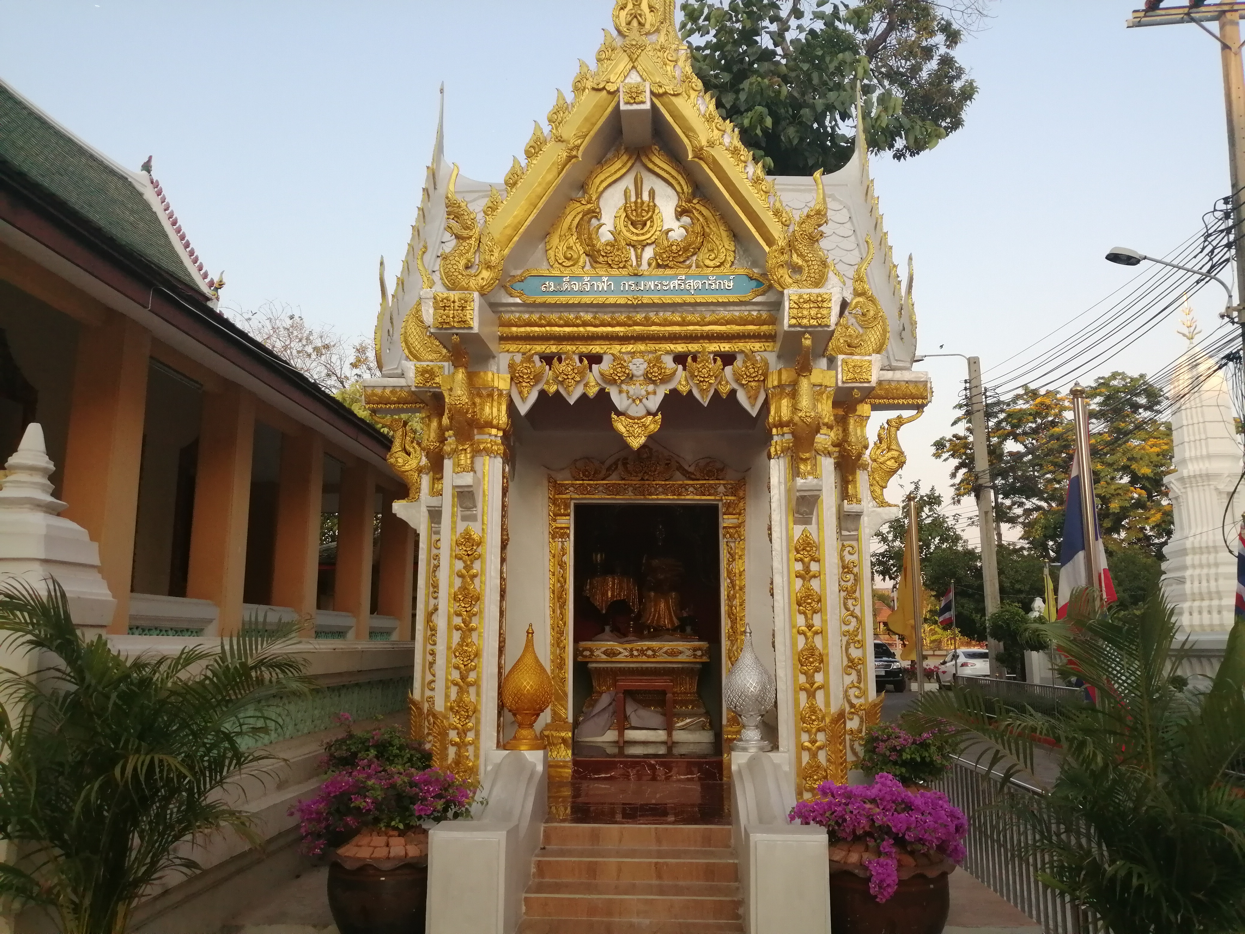 พระราชานุสาวรีย์ สมเด็จเจ้าฟ้ากรมพระศรีสุดารักษ์